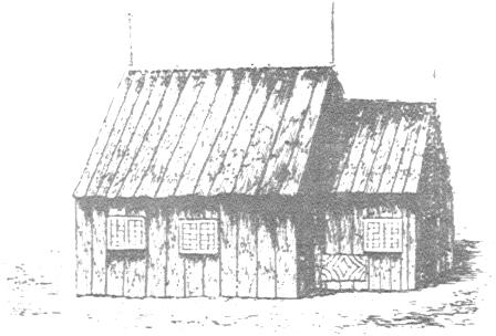 Heggland gamle kirke fra 1671, tegnet av lensmann Lars Abraham Qvisling og gjengitt i Skillingsmagazin 1845. Fra Lokalhistoriewiki.